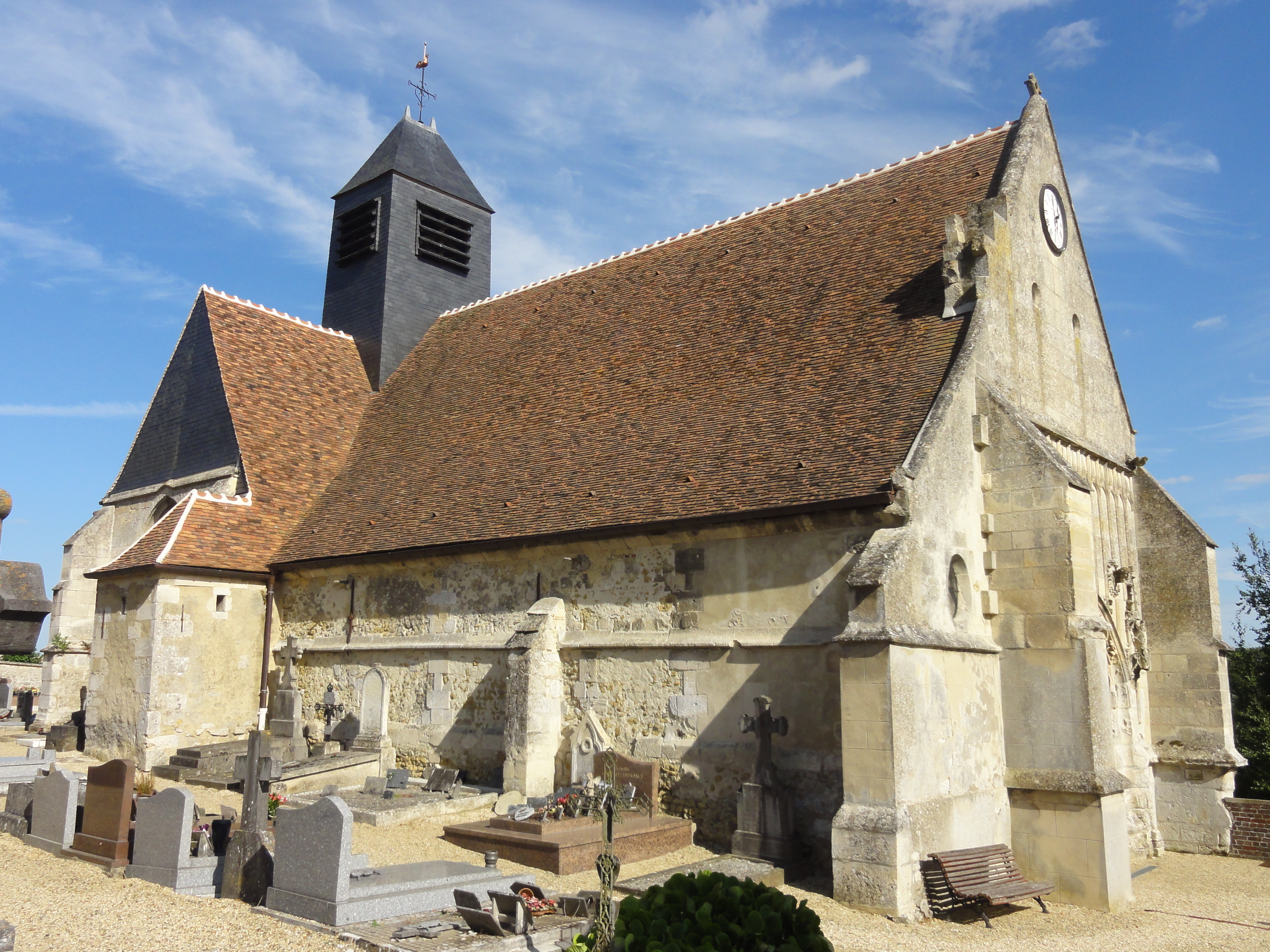 Église Saint-Wandrille de Rivecourt (voir titre).